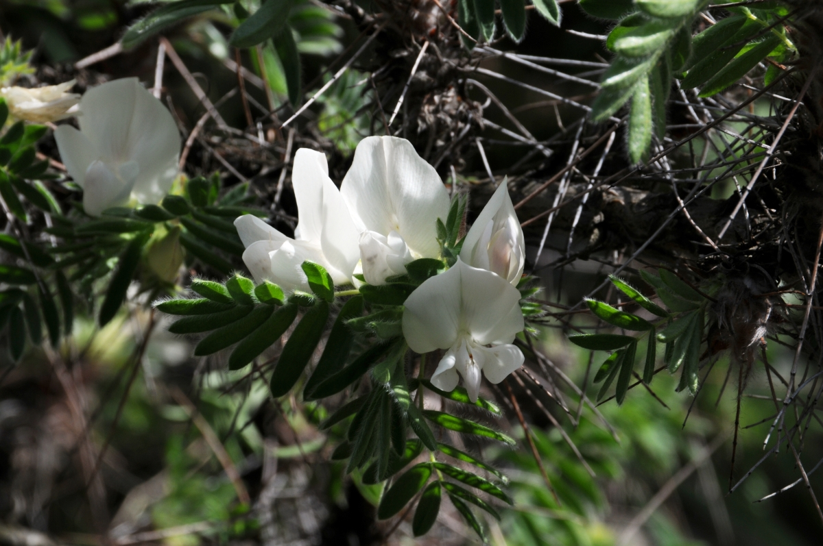 Caragana jubata, Palmengarten, Frankfurt am Main, Hessen, Deutschland